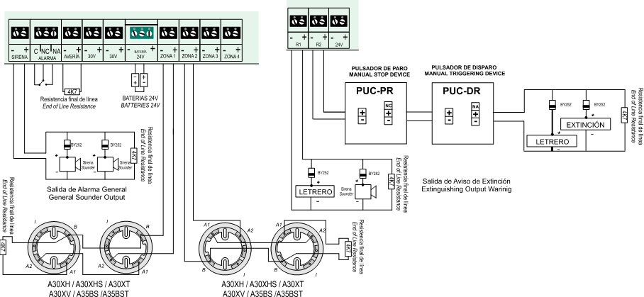 Esquema de conexión desde un panel convencional y un panel de extinción